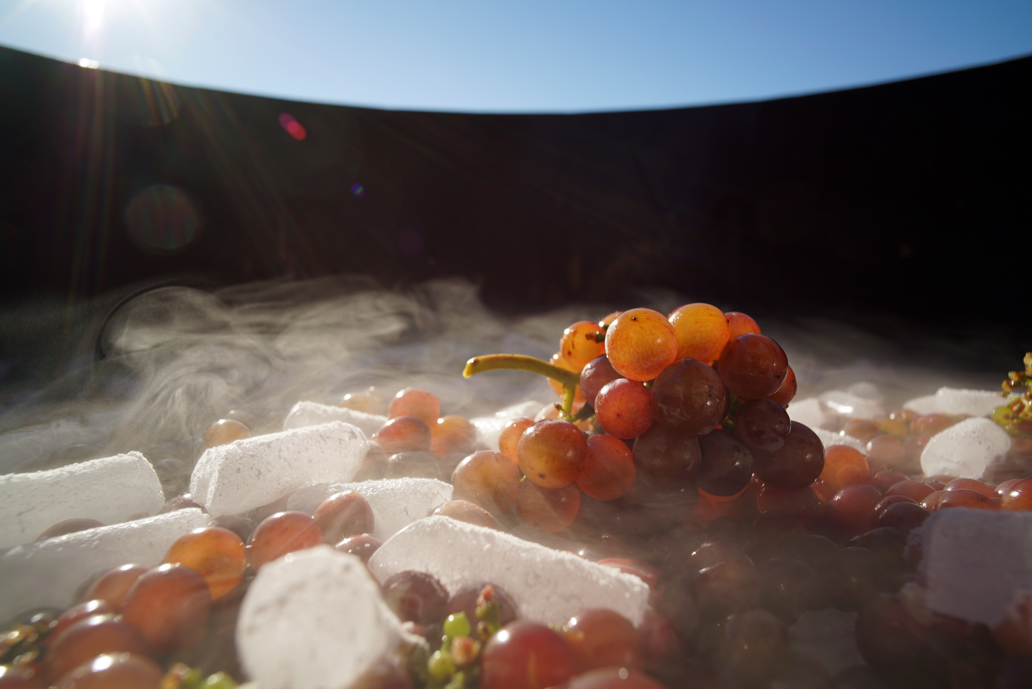 Glace carbonique / Carboglace